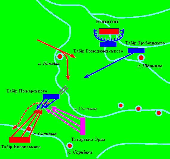 Конотопська битва